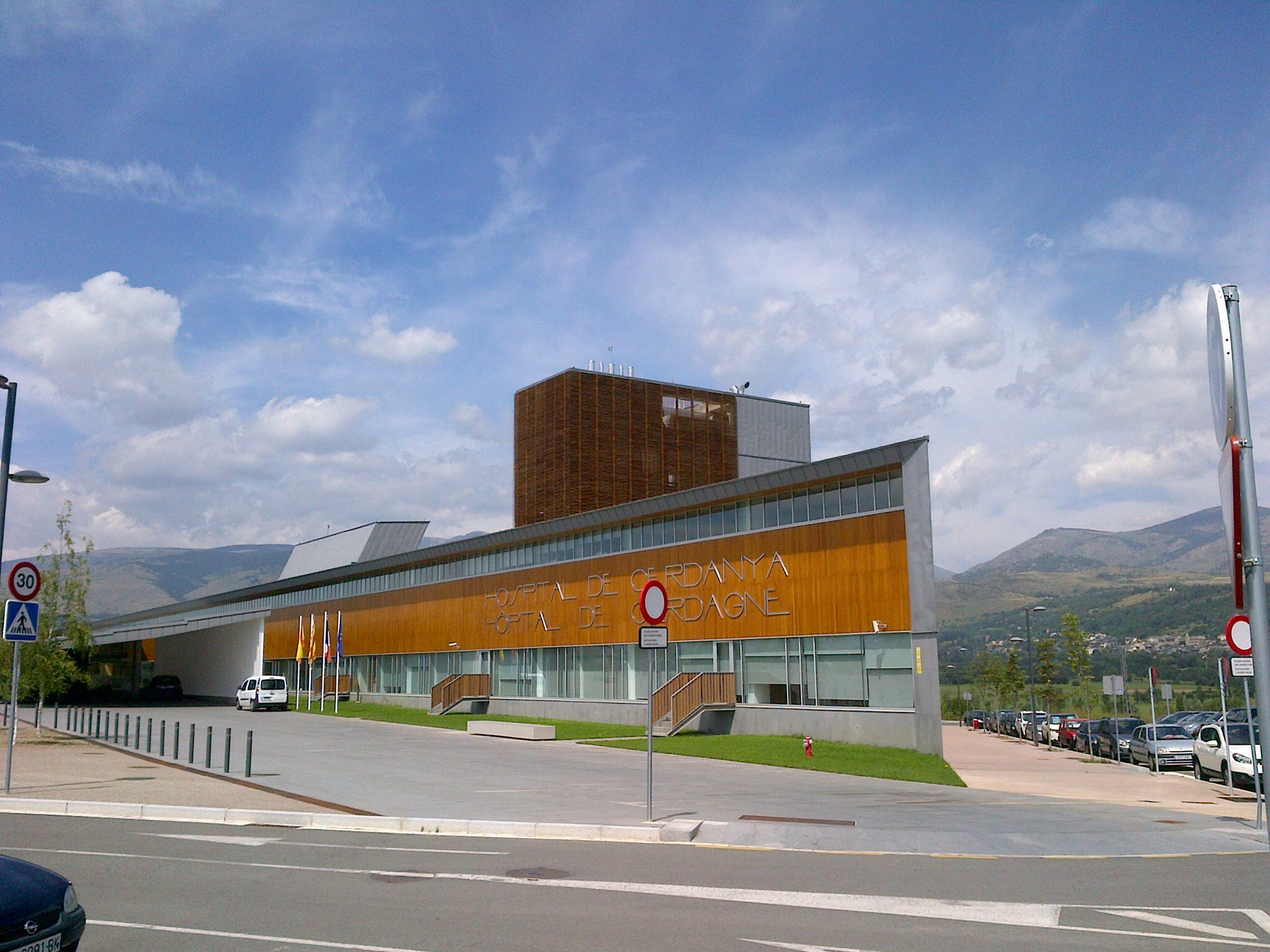 Hospital transfronterer de la Cerdanya, a Puigcerdà